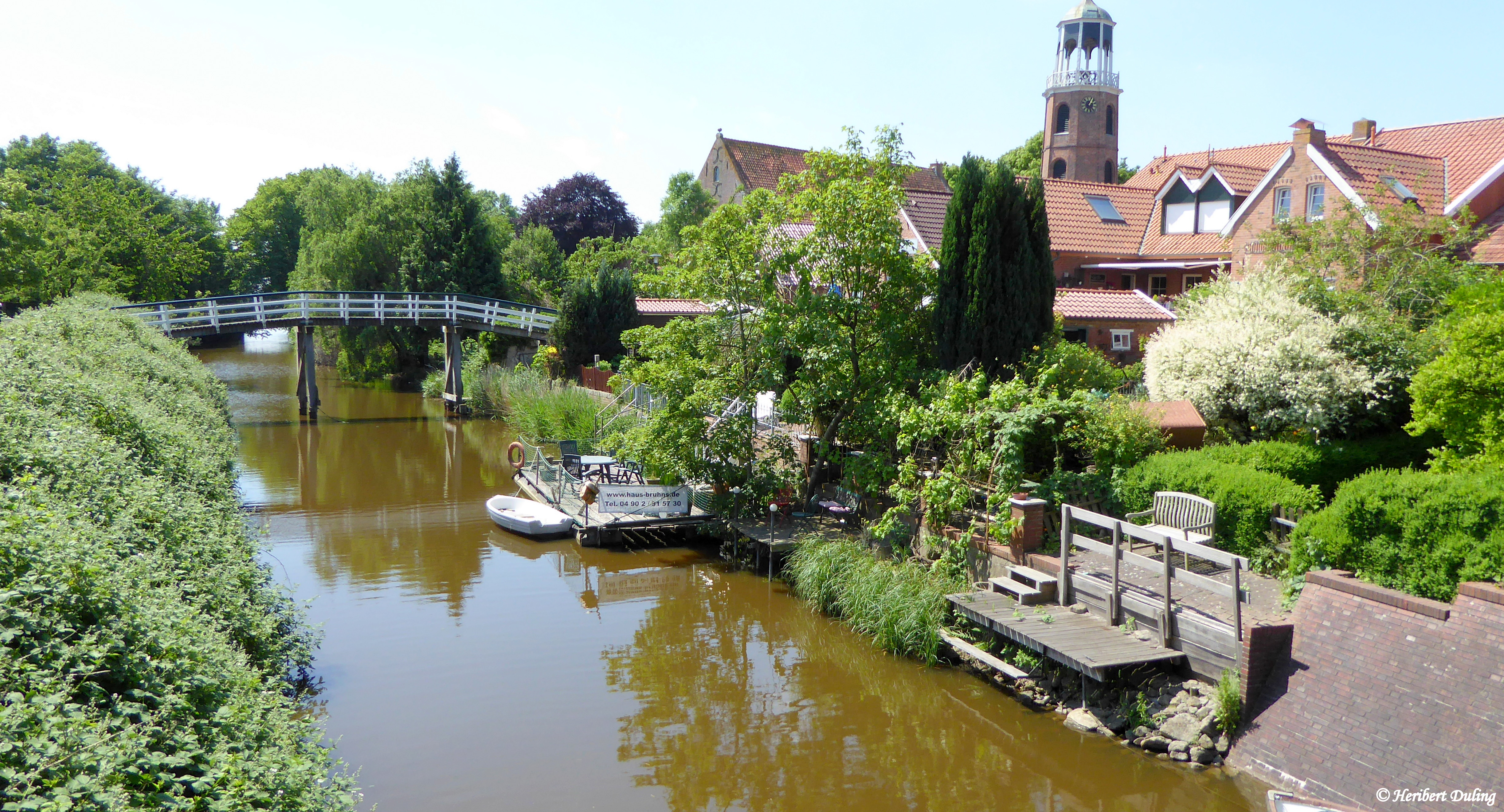 Dietzum-Bunder-Sieltief in Ditzum